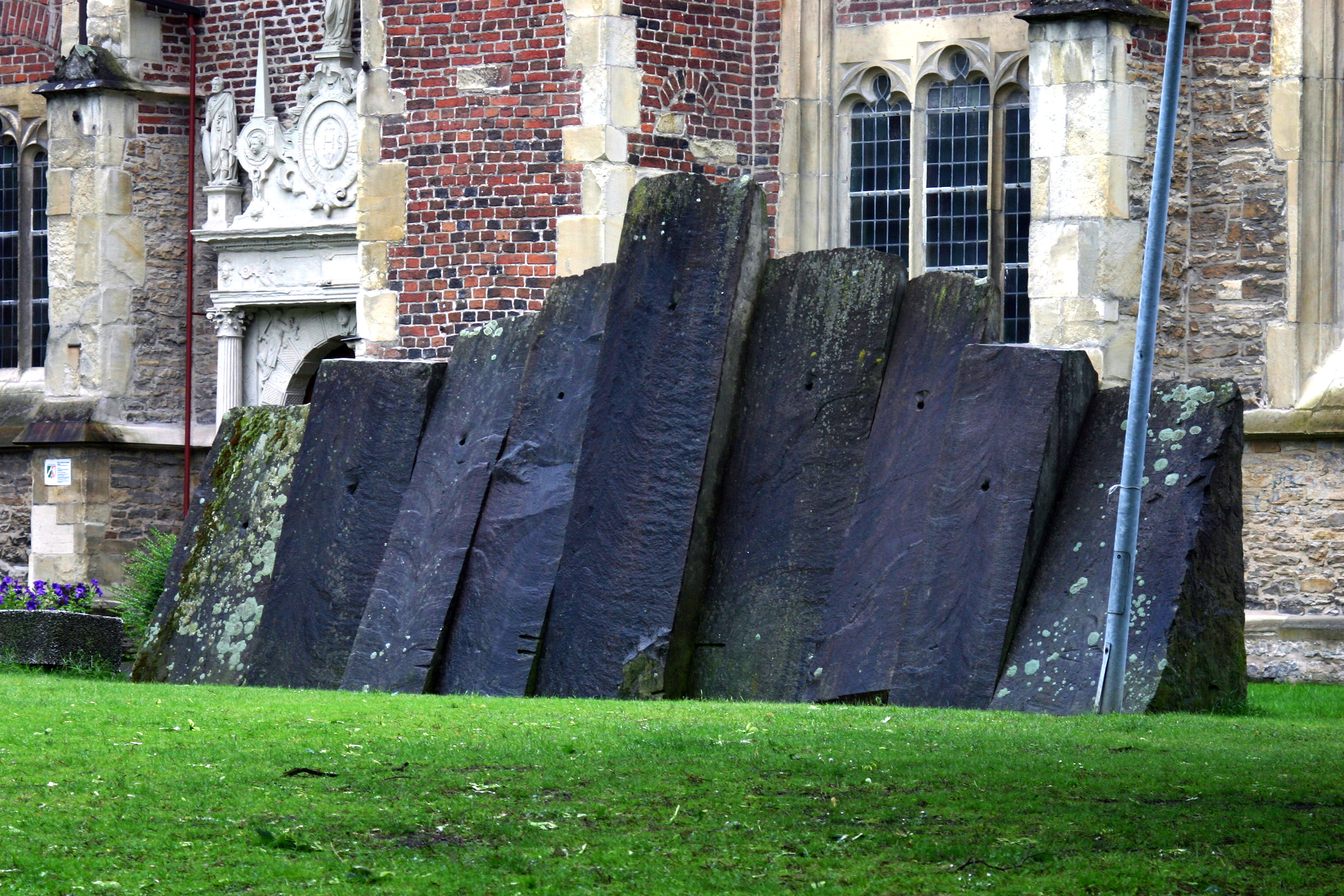 Ulrich Rückriem - Dolomit zugeschnitten - 1977 - Standort: Petrikirche, Jesuitengang